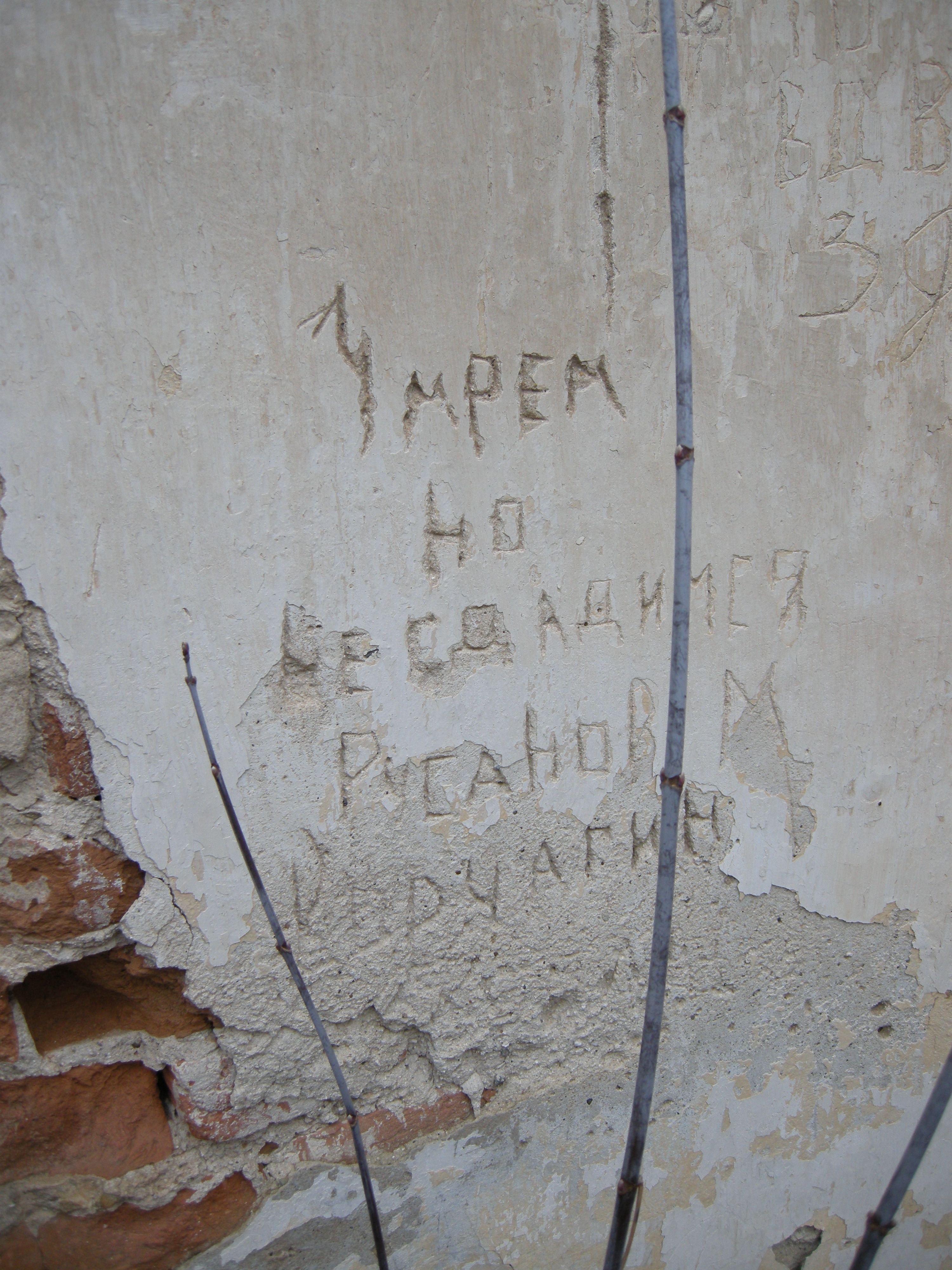 Російське графіті на стіні палацу.